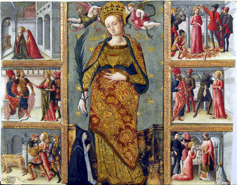 Quirizio da Murano, Santa Lucia. Auteur décédé depuis plus de 100 ans